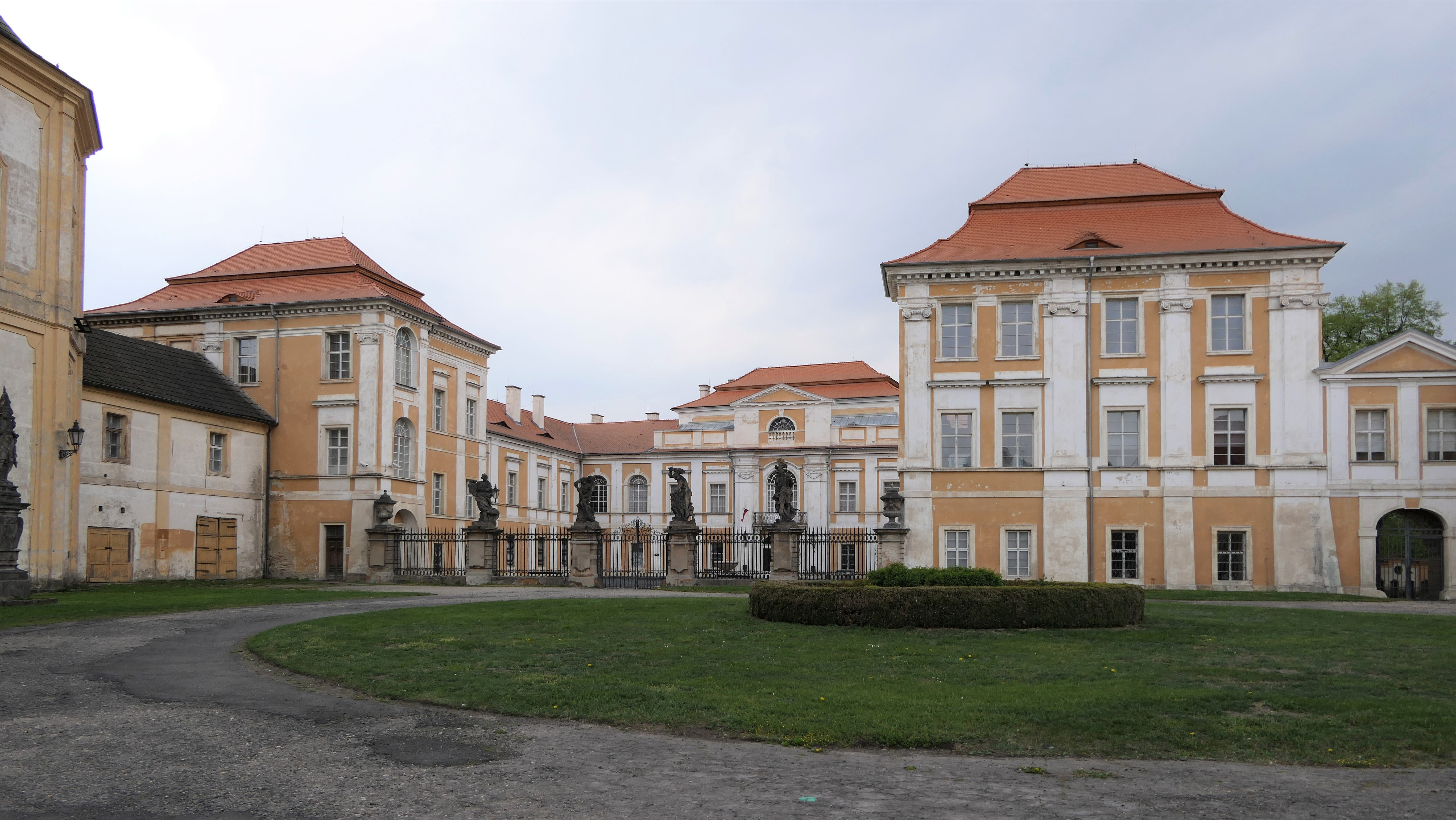 Schloss Dux in Duchcov